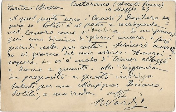 Cartolina postale spedita da Castorano (Ascoli Piceno) il 12 maggio 1923 da Sigismondo Nardi al pittore Antonio Mosca via dei Cappuccini, 6 Bologna per prendere accordi per i lavori di restauro e decorazione della parrocchia di Borgo Valsugana